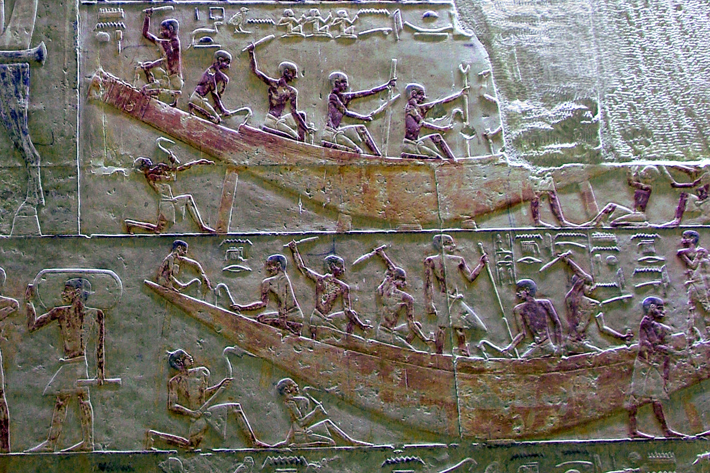 Ägypten, Sakkara, Mastaba des Ti